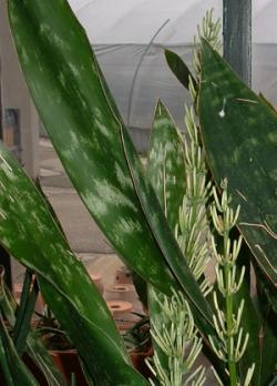 sanseveria jardin botanique de Lyon